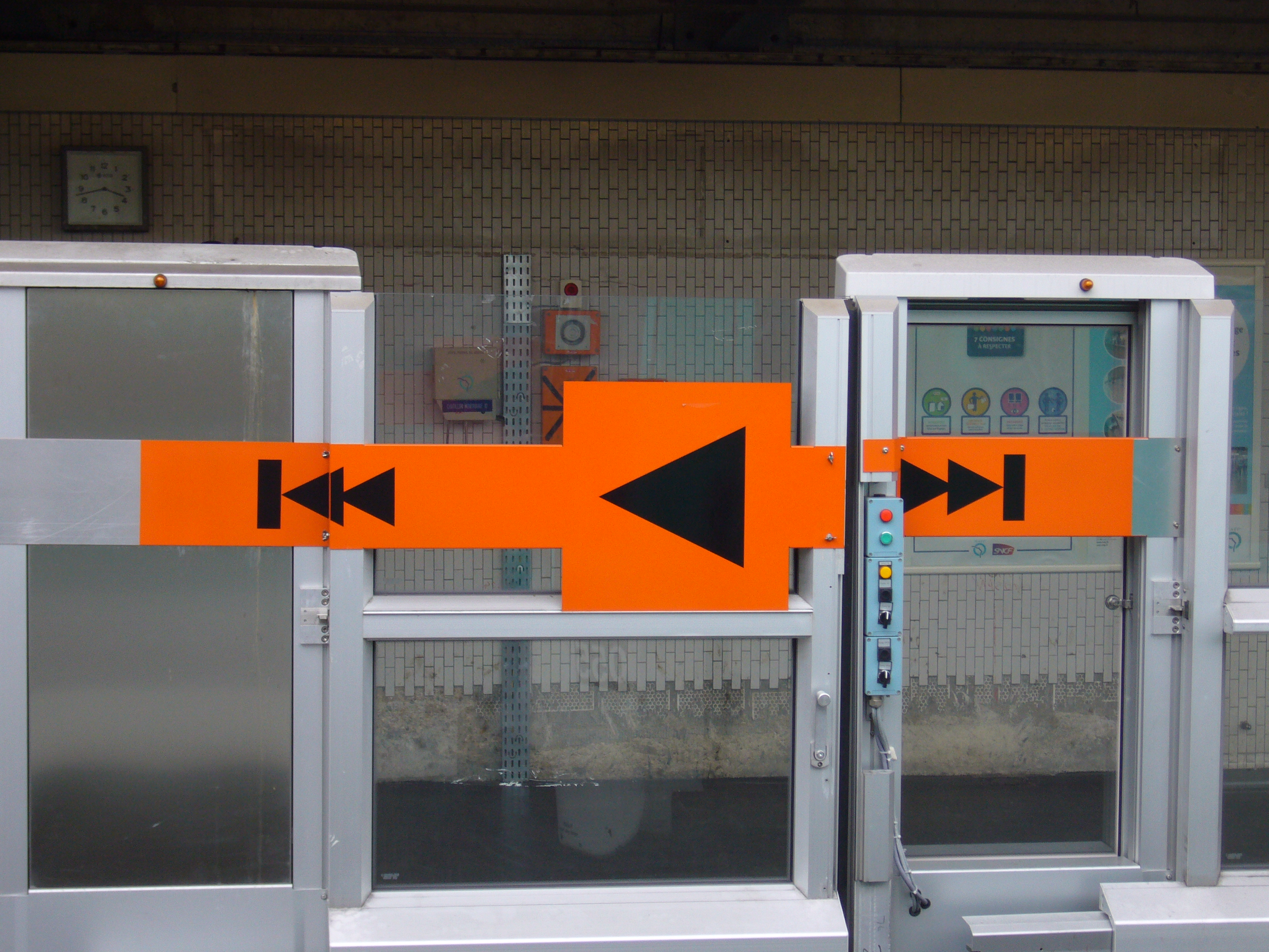 Cible marquant le point auquel la rame doit s'arrêter pour permettre l'ouverture des portes palières et commandes conducteurs de contrôle des portes palières de la station Châtillon - Montrouge sur la ligne 13 du métro de Paris.